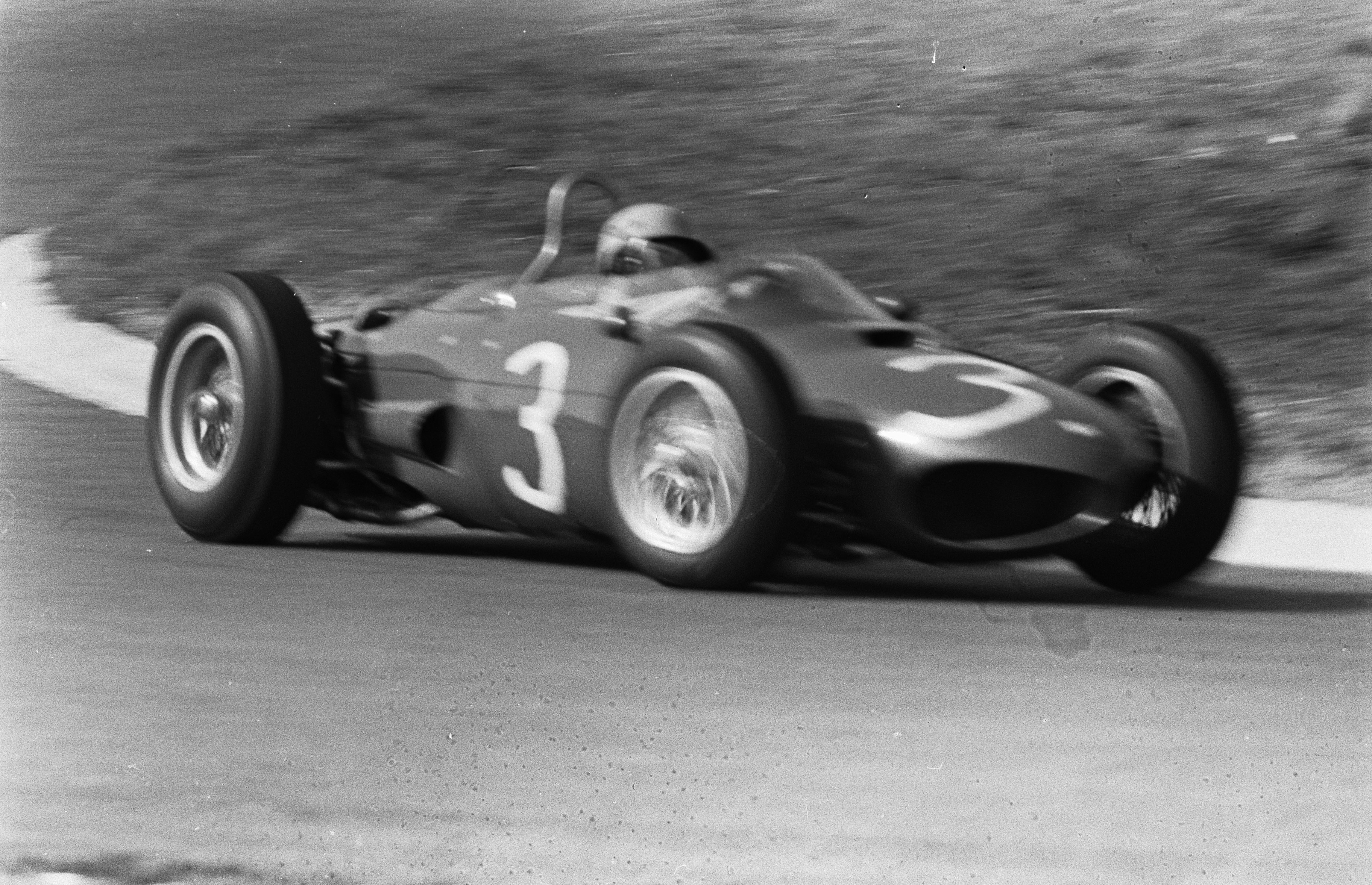 Trainingsritten op Circuit van Zandvoort.